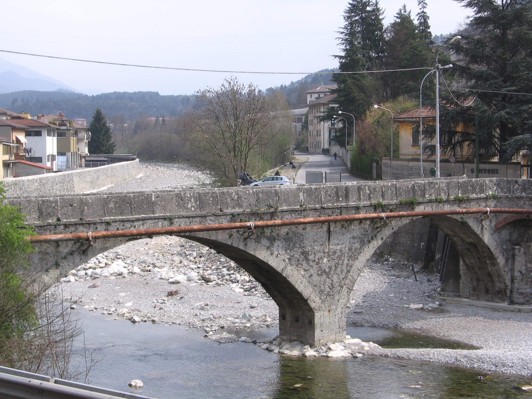 Ponte Nossa, Bergamo, Italia